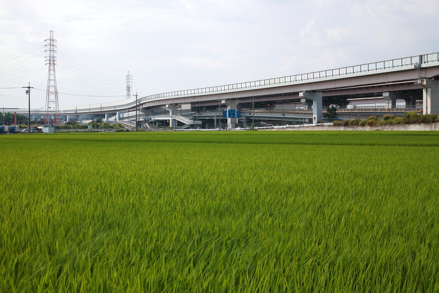 豊明インターチェンジ遠景（豊明市、2013年）